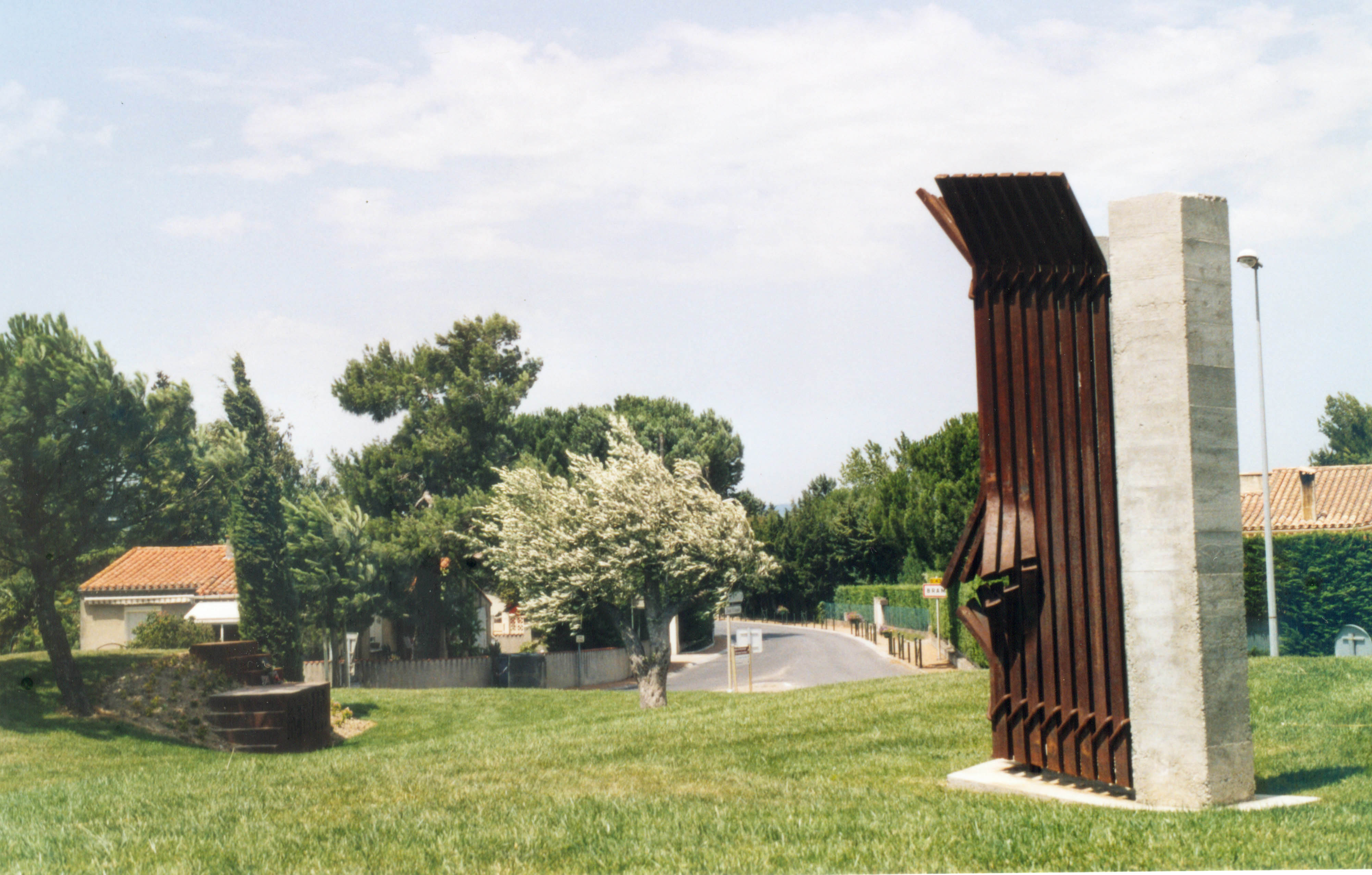 Bram